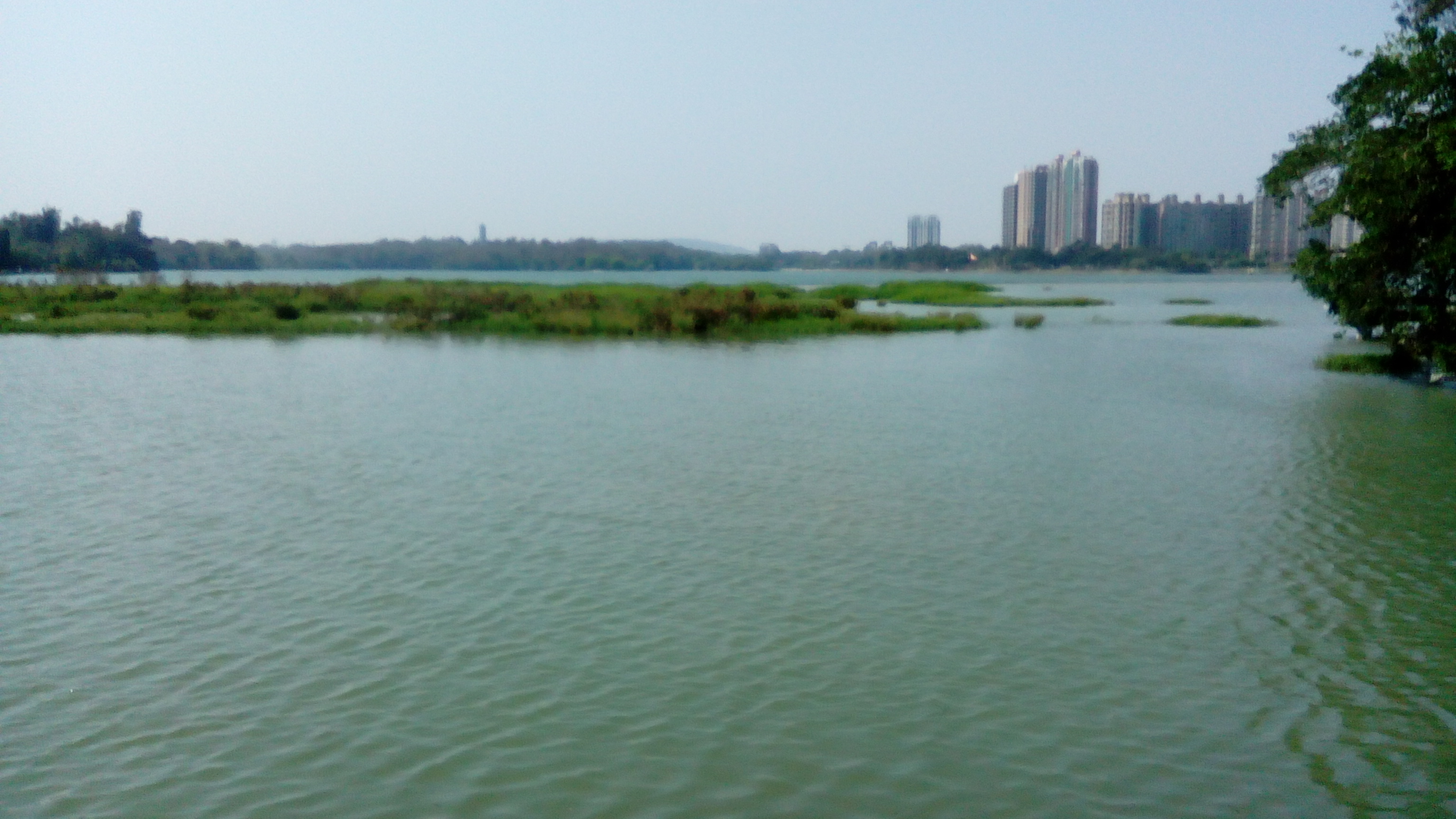 從湖南畔眺望鳥松大廈群